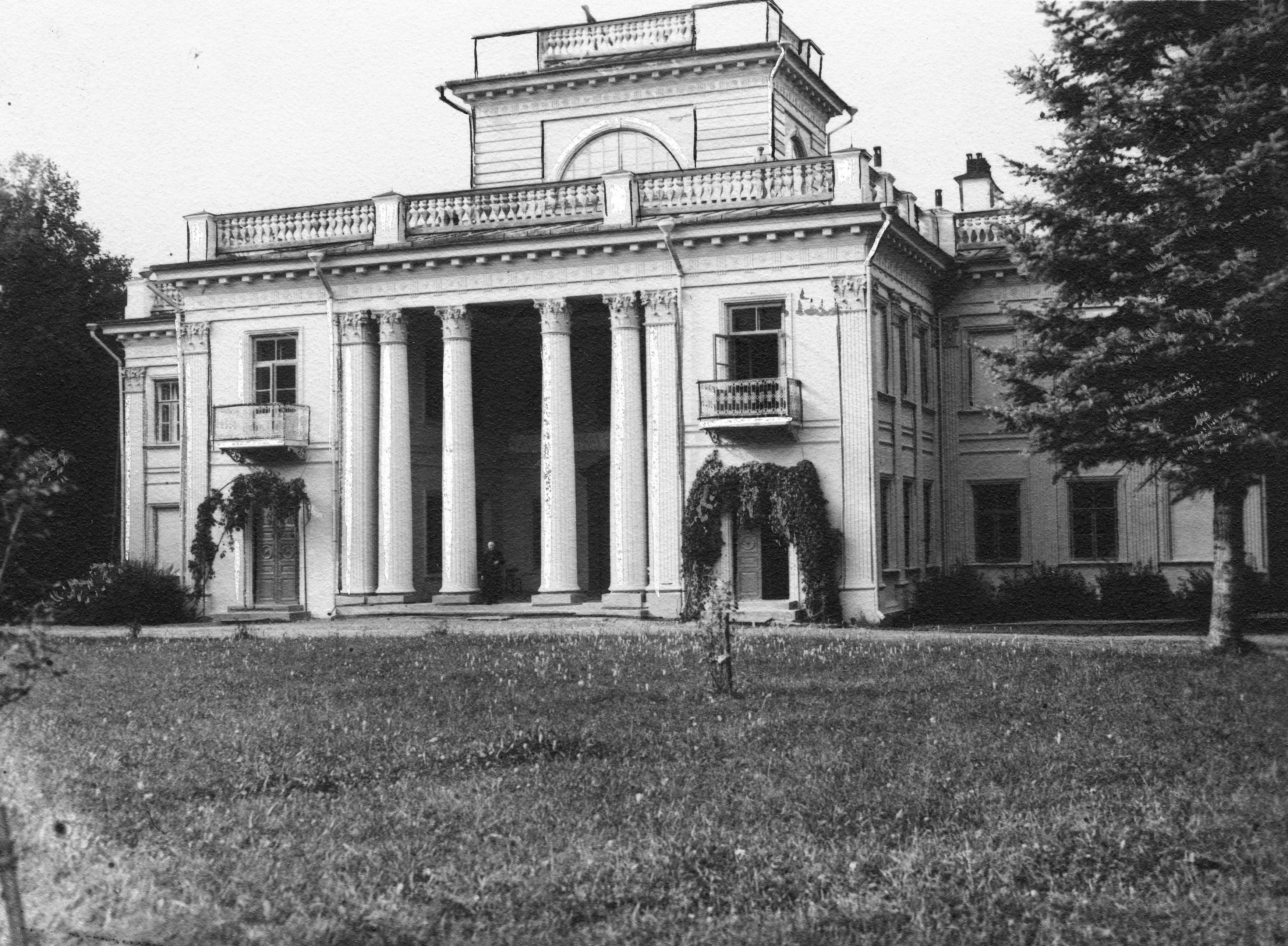 Беларуская (тарашкевіца): Жэмласлаў (Žemłasłaŭ), сядзіба Ўмястоўскіх (Umiastoŭski)